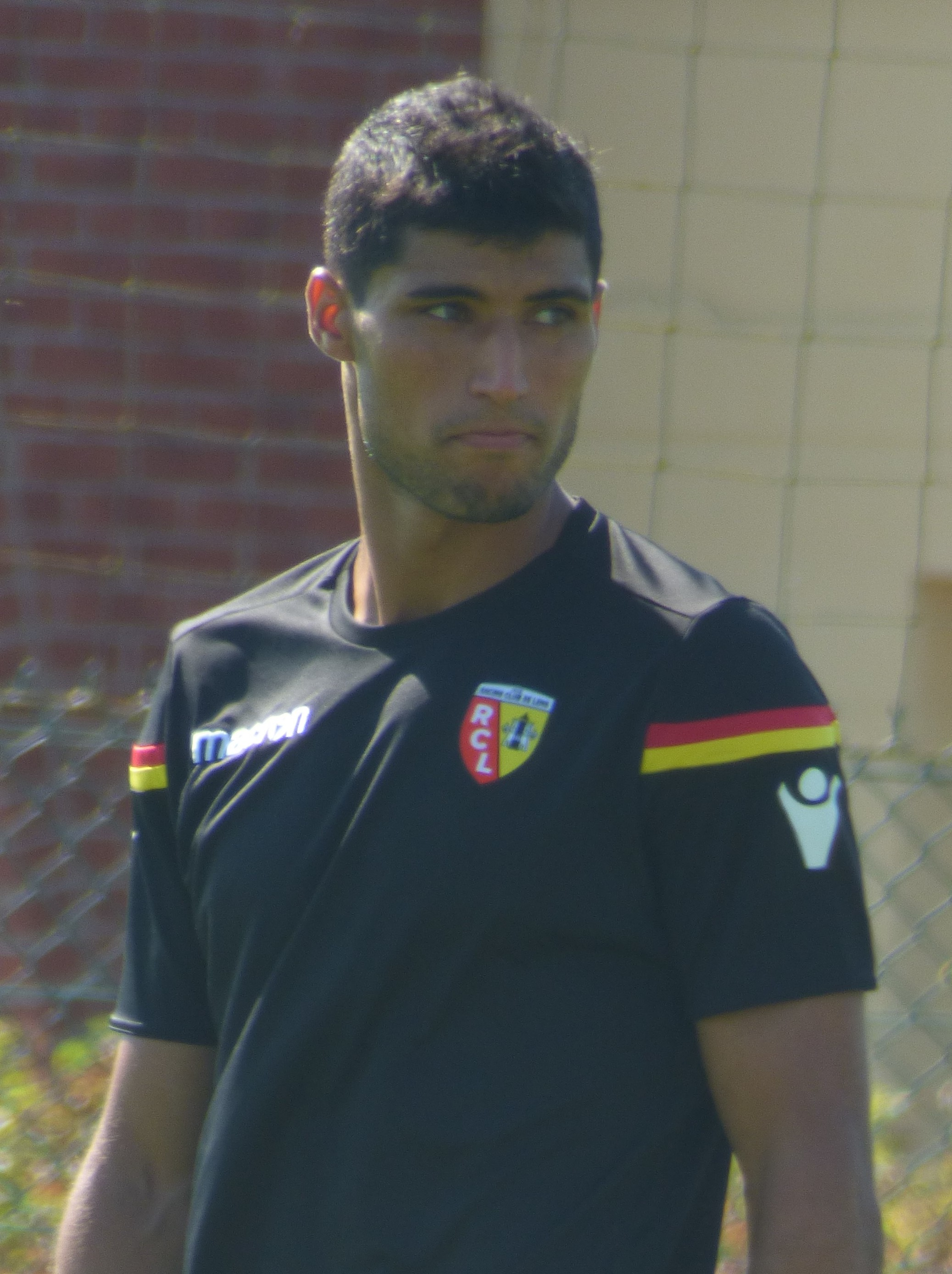 Seif Teka, mis à l'essai par le Racing Club de Lens, lors d'un entraînement public, le 2 août 2018, au Centre technique et sportif de La Gaillette à Avion.